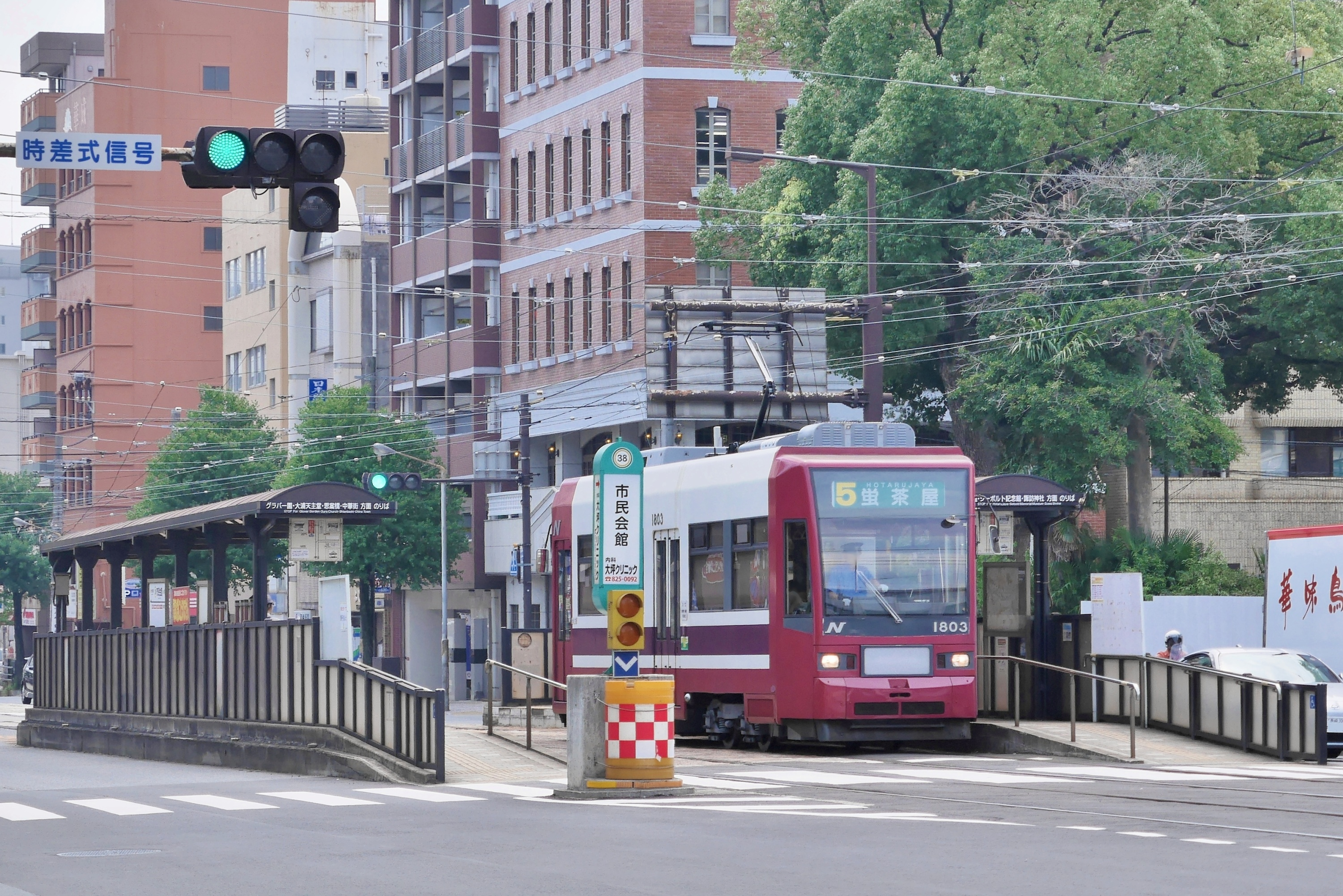 長崎電気軌道の「市民会館（2・4・5号系統）」停留所（長崎県長崎市）。